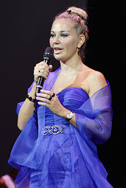 Выступление Марии Максаковой на 60-летии Санкт-Петербургского суворовского военного училища